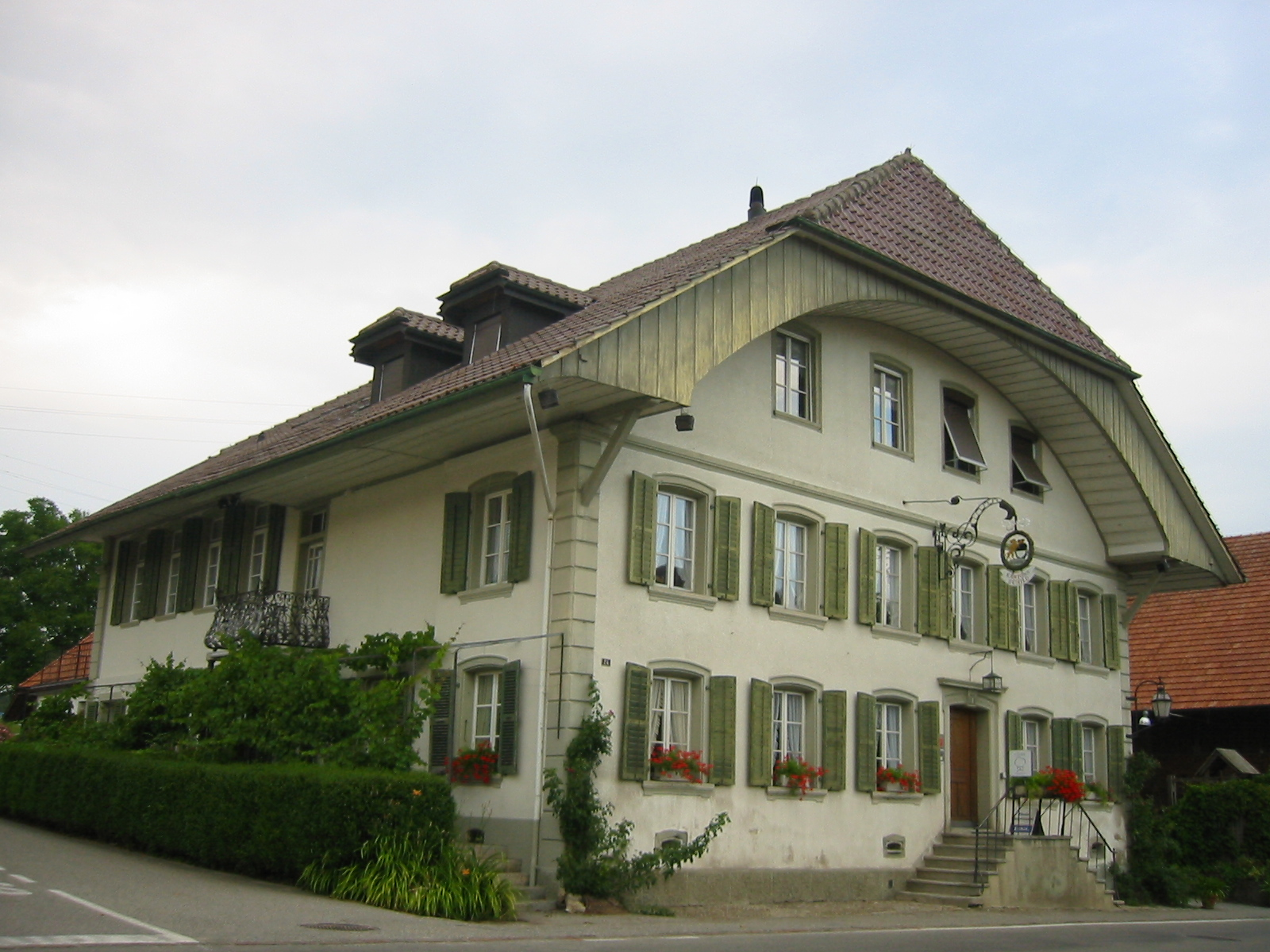 Farms in the canton of Bern